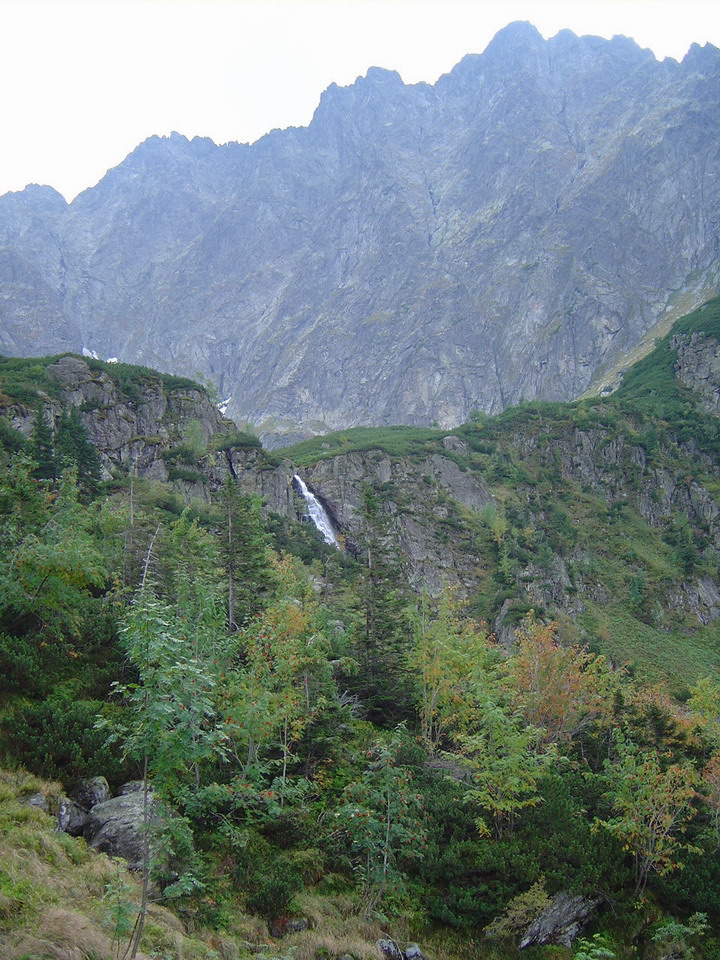 Hviezdoslavov vodopad under Ganok